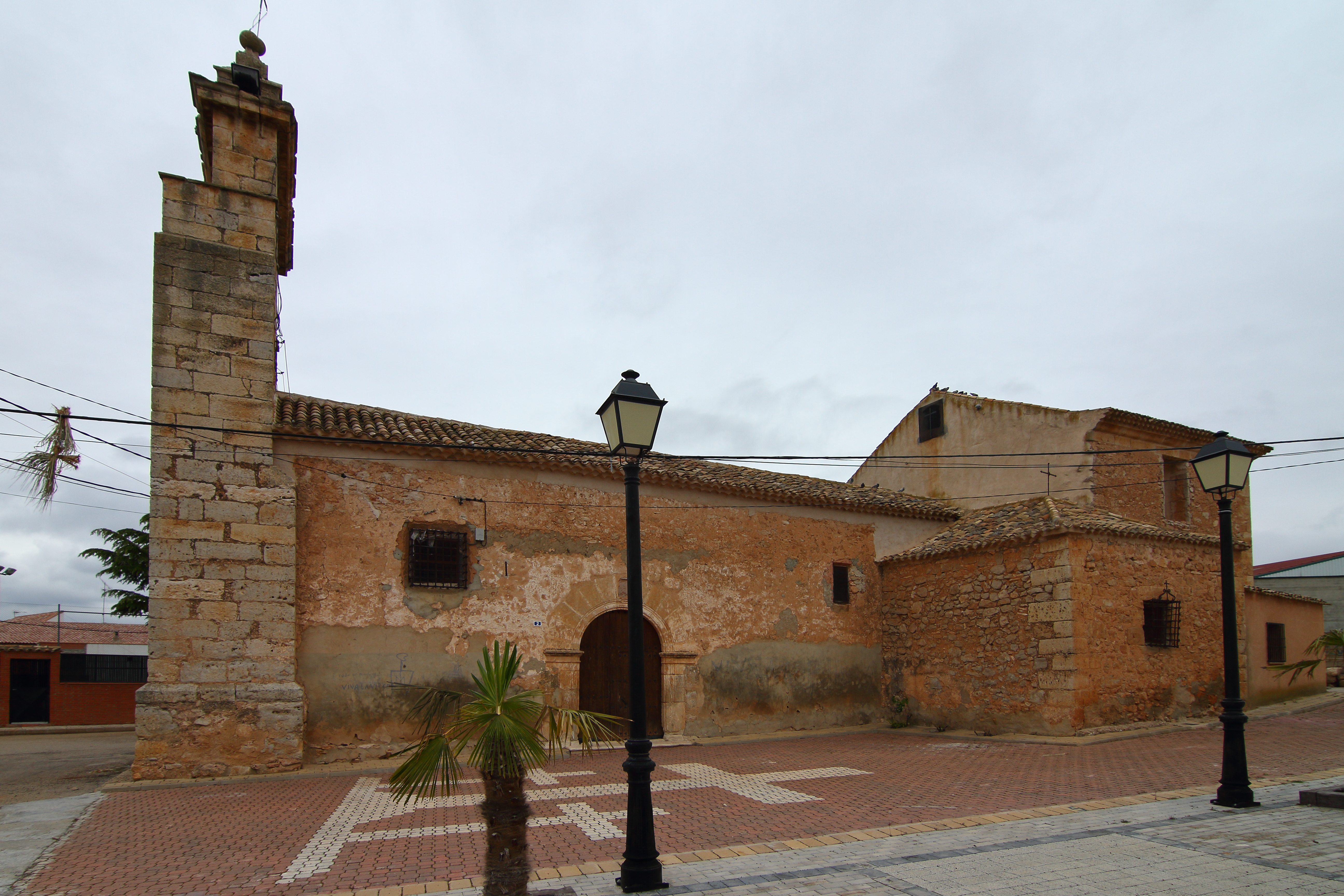 Castillejo de Iniesta, Iglesia parroquial, fachada principal